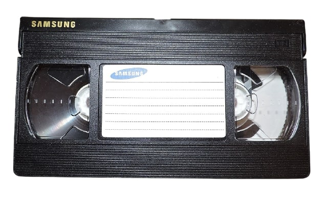 Классическая видеокассета (VHS)